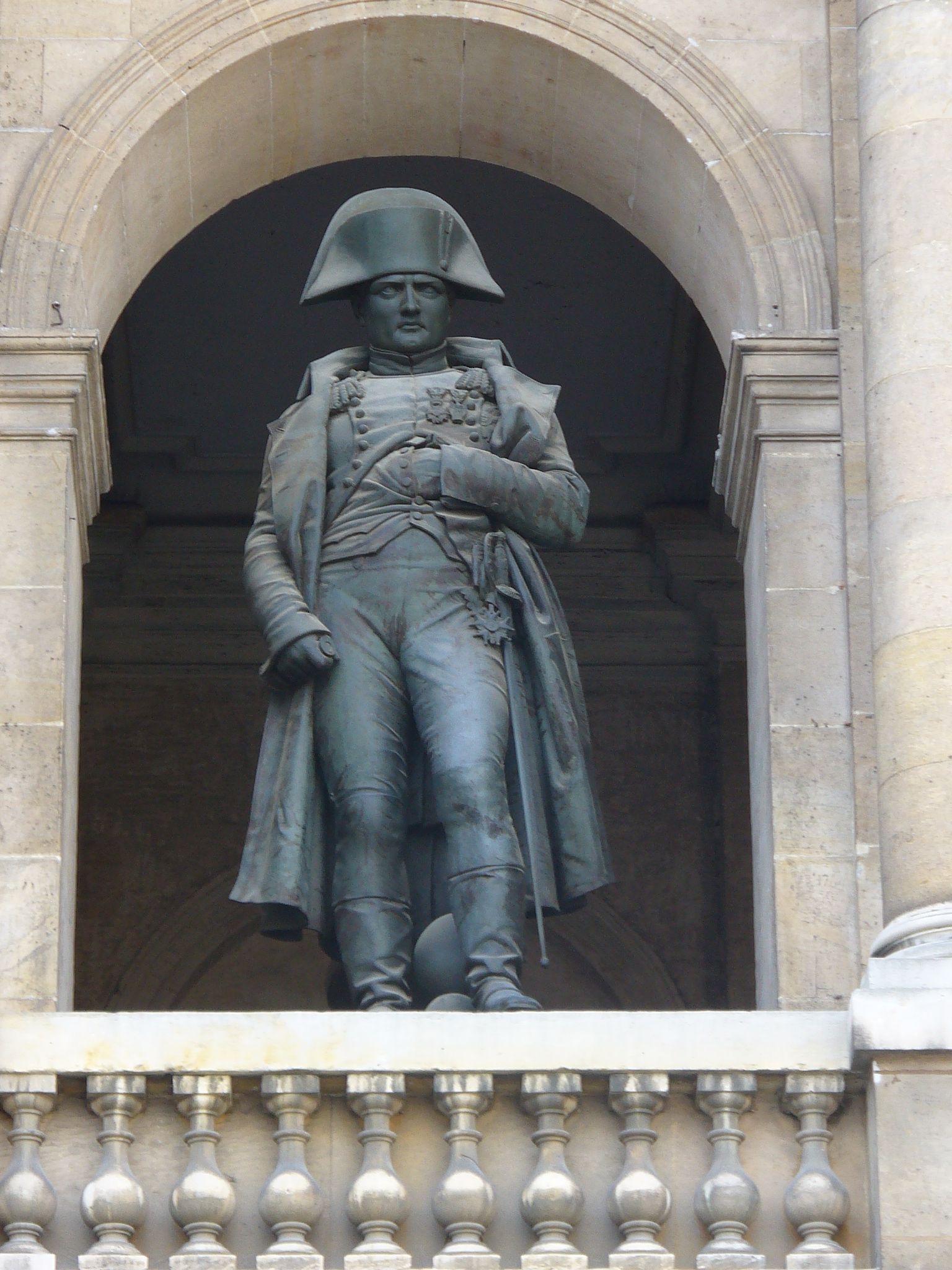 Emile Seurre: Napoléon Ier en petit caporal, statue en pied, 1833, Cour d'Honneur de l'Hôtel des Invalides, Paris, France. Cette statue se trouvait auparavant sur la colonne Vendôme.